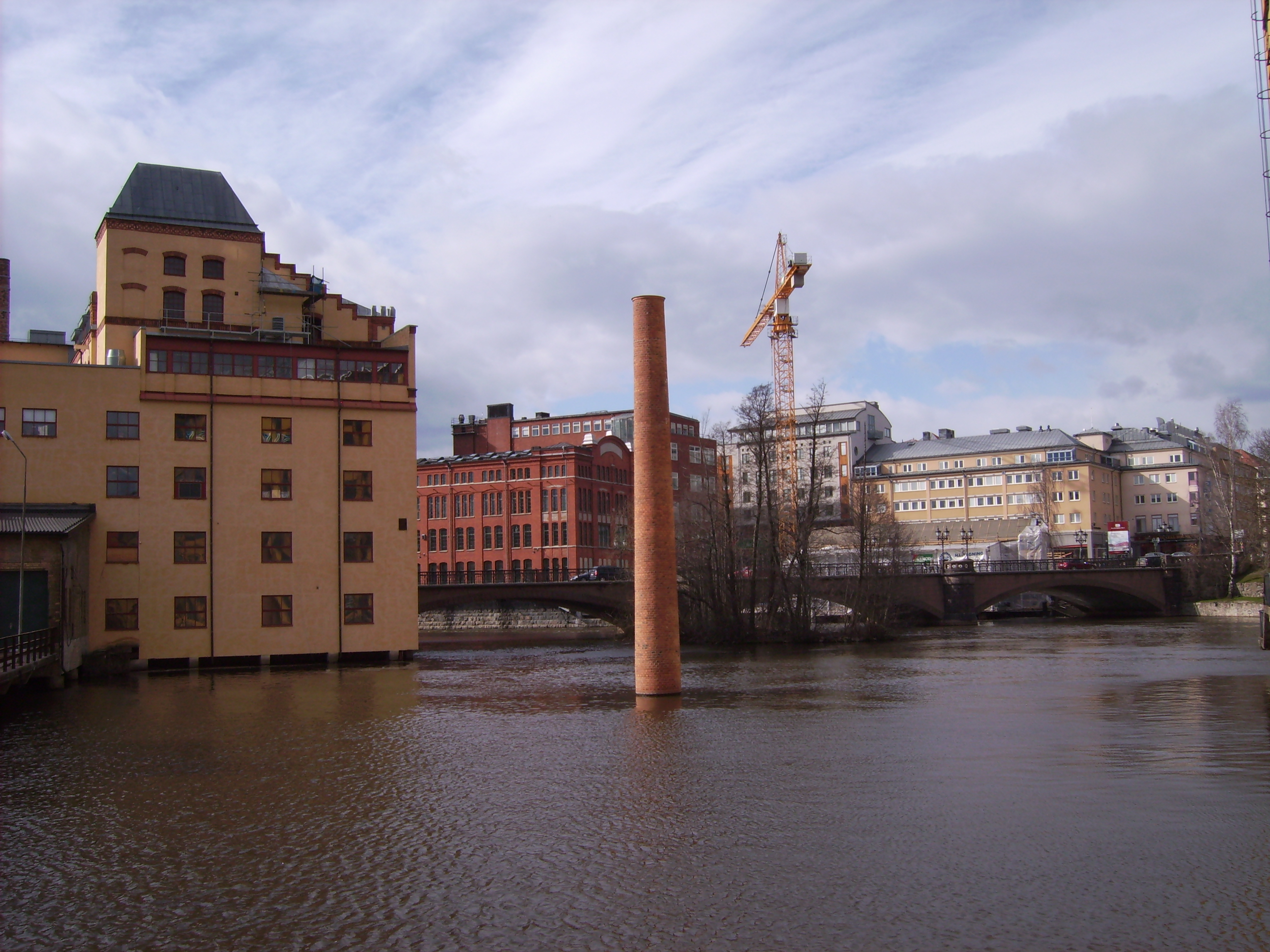 Bilden är fotograferad av Harri Blomberg. Photo by Harri Blomberg.